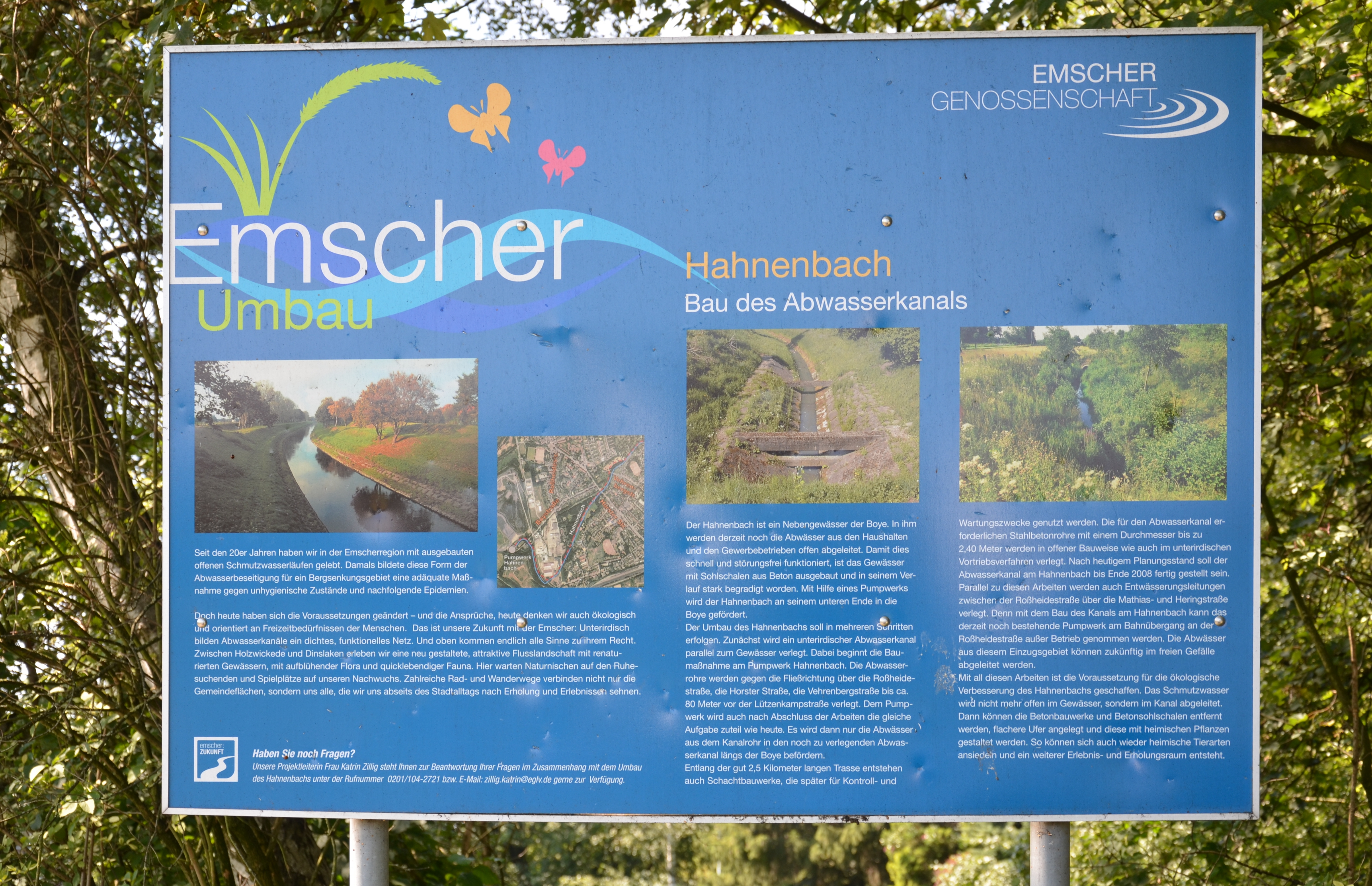 Der Hahnenbach ist ein Nebenfluss der Boye, die wiederum in die Emscher mündet. Informationstafel zum Umbau